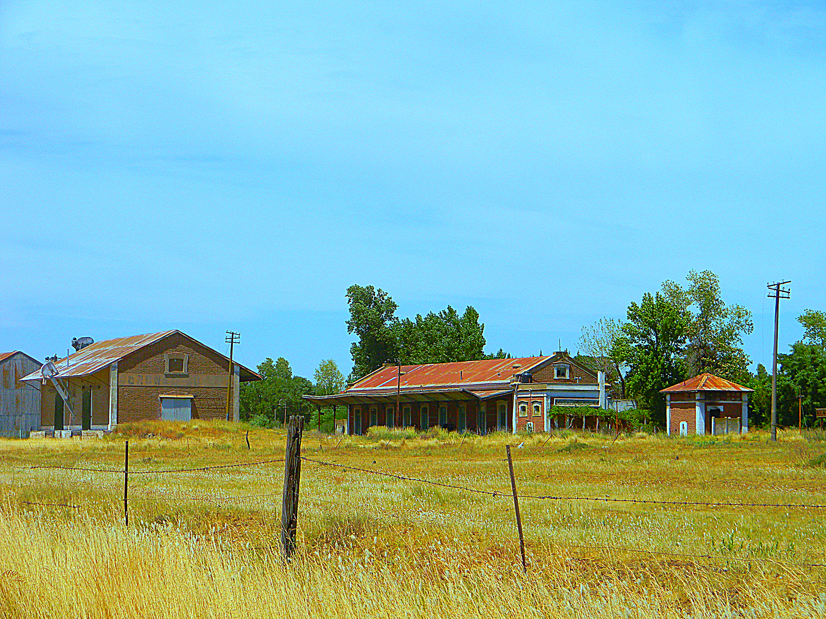 Estación Coronel Suarez Ferrocarril Rosario a Puerto Belgrano, en desuso